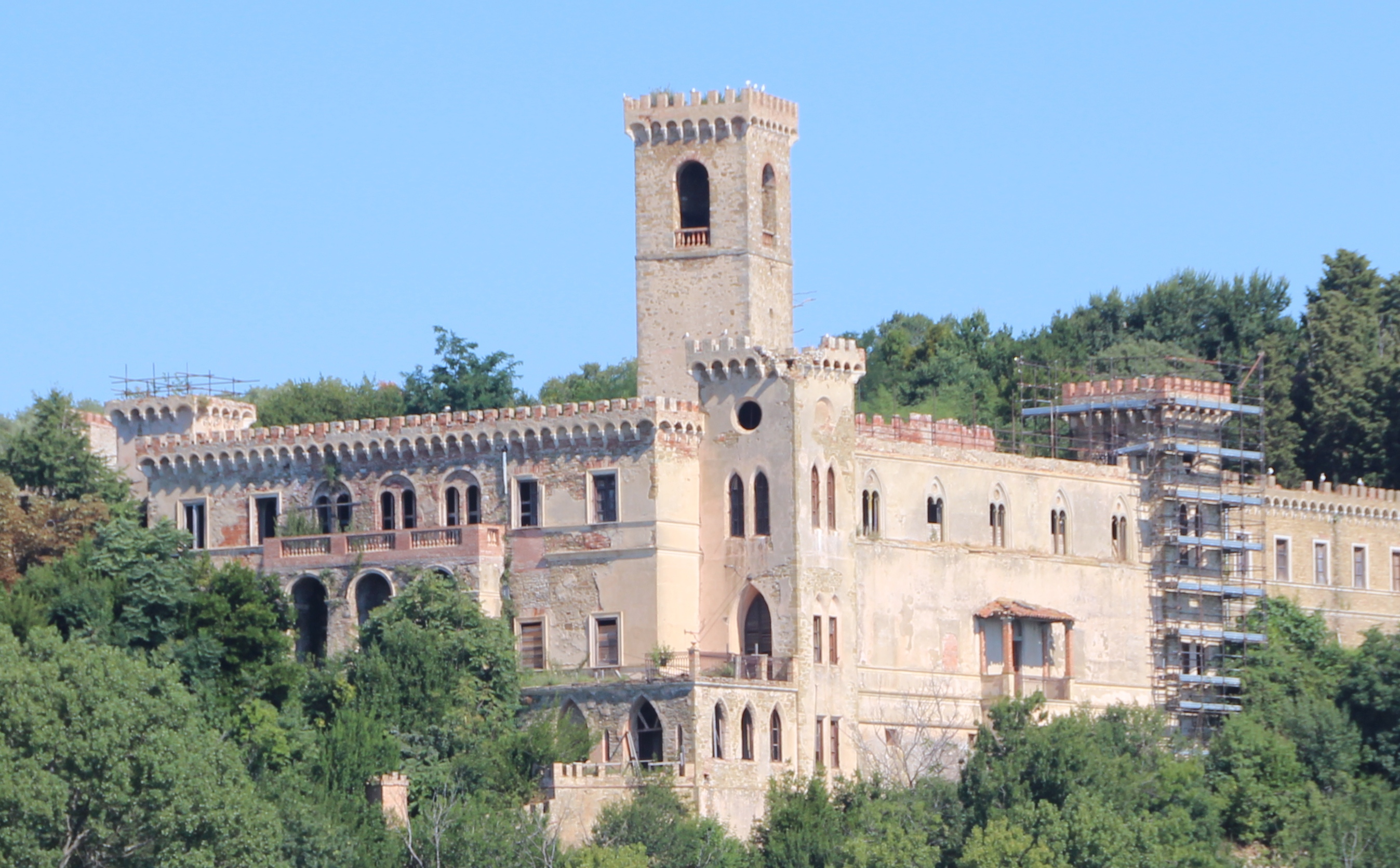 Isola Maggiore Villa Isabella